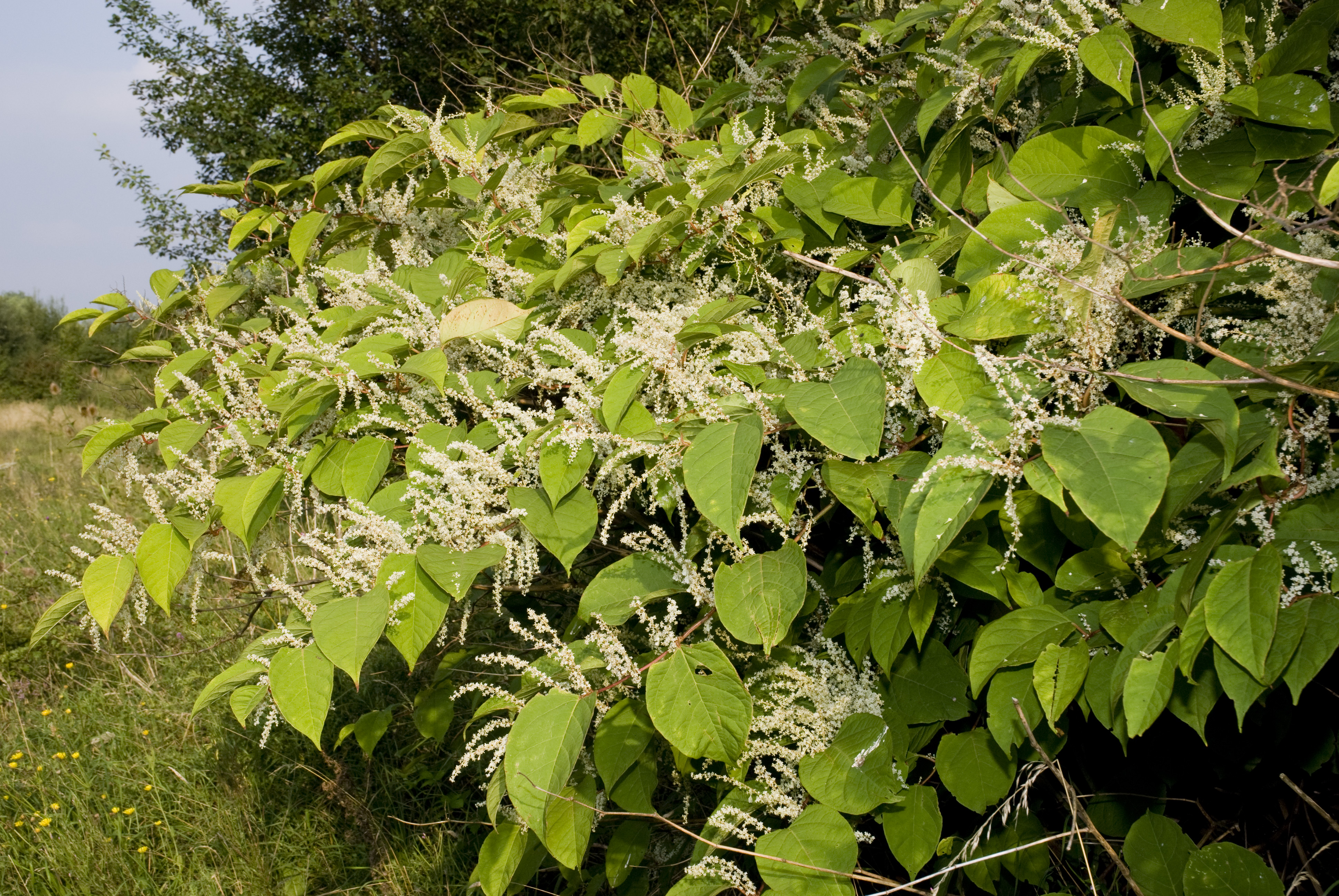 Reynoutria japonica Vallée de Grâce à Amiens (Somme), France